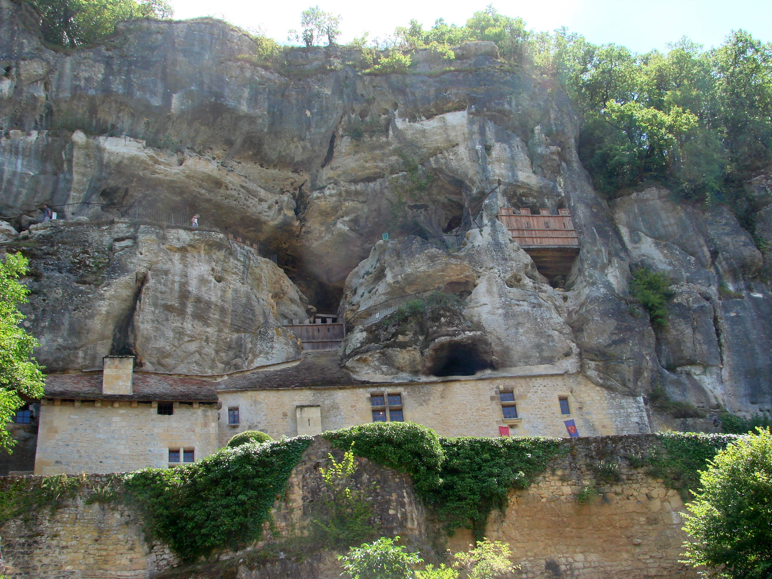 La maison forte de Reignac est un château situé sur la commune de Tursac en Dordogne, et demeure le dernier exemple intact de château-falaise en France.